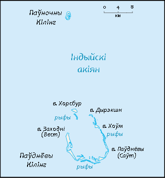 Карта Какосавых (Кілінг) астравоў